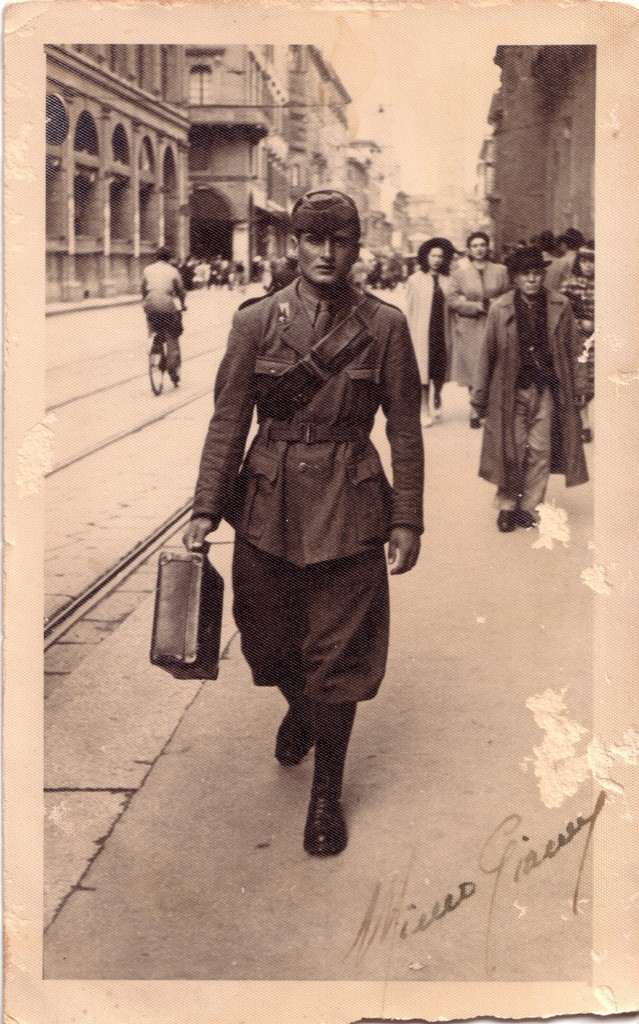 Foto di Gianni Mineo mentre era militare, nel 1941, a Bologna